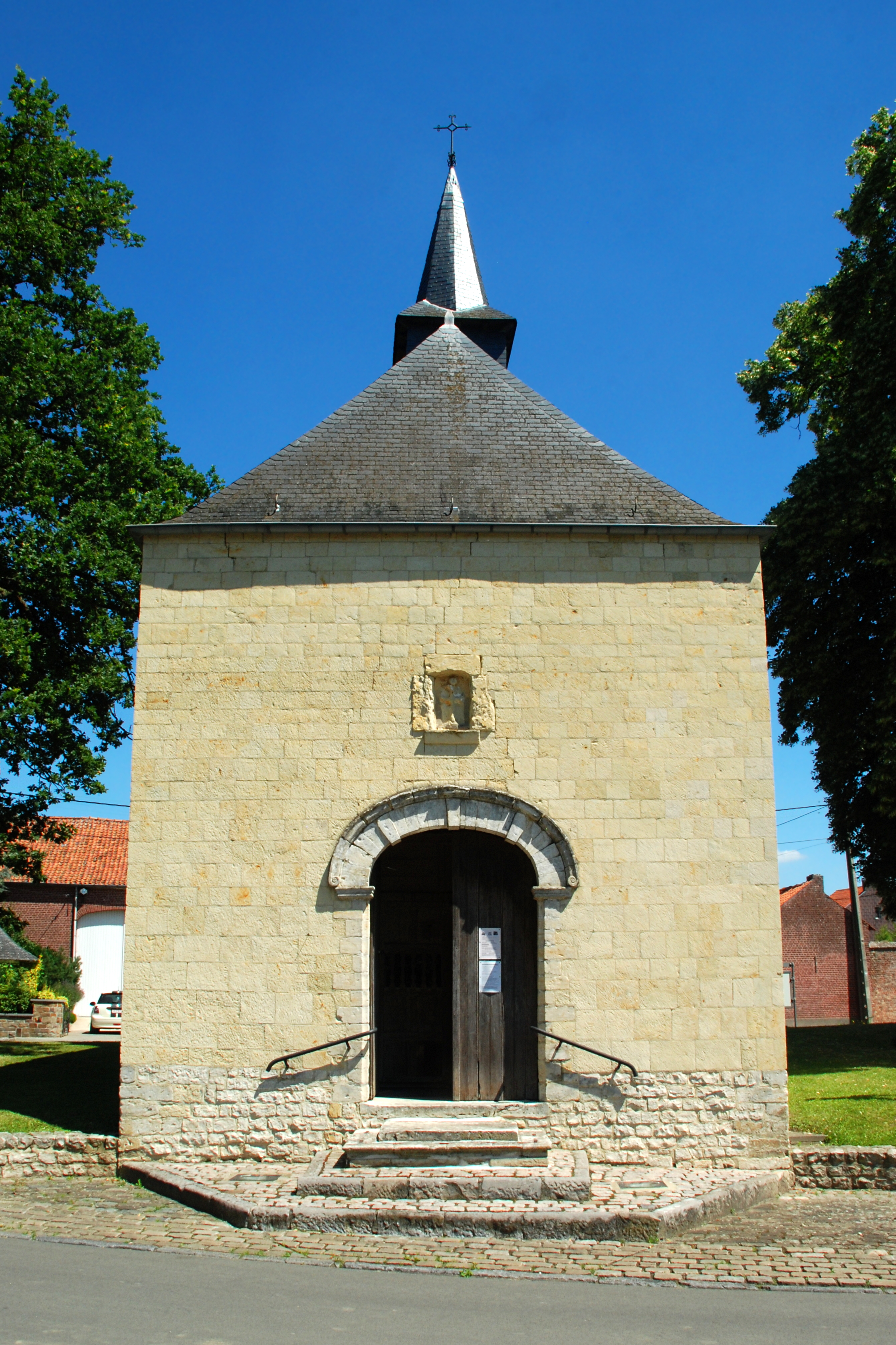 Belgique - Brabant wallon - Hélécine - Linsmeau - Chapelle Notre-Dame de la Colombe